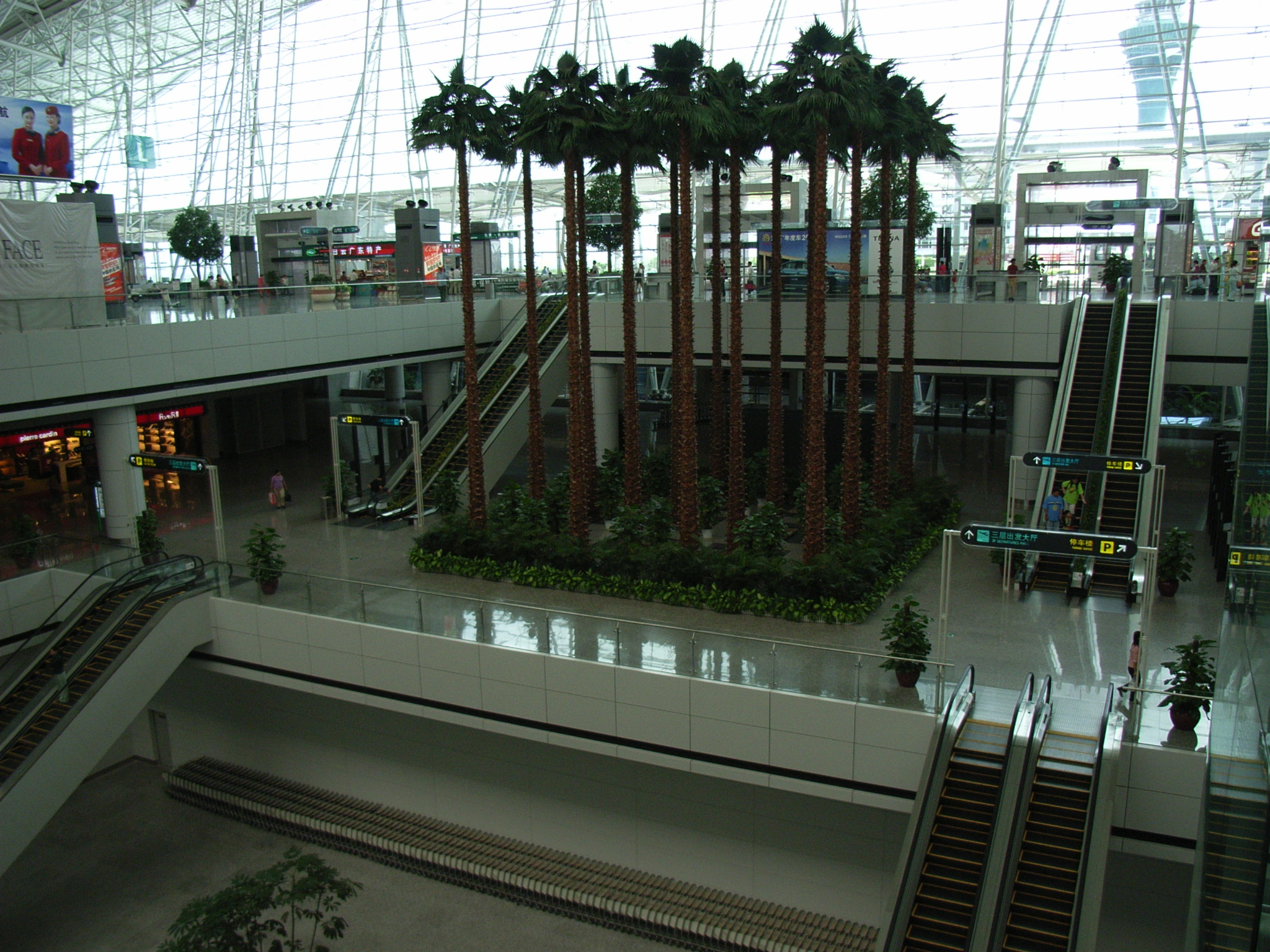 广州白云国际机场出发大厅中庭；个人作品；摄于2006年7月2日，由上传者User:老火豆沙煲拍摄